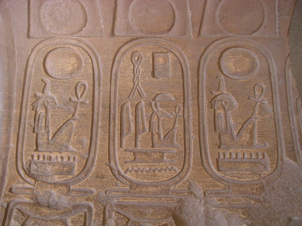 Corniche inscrite aux cartouches de Séthi Ier - XIXe dynastie égyptienne - Memphis